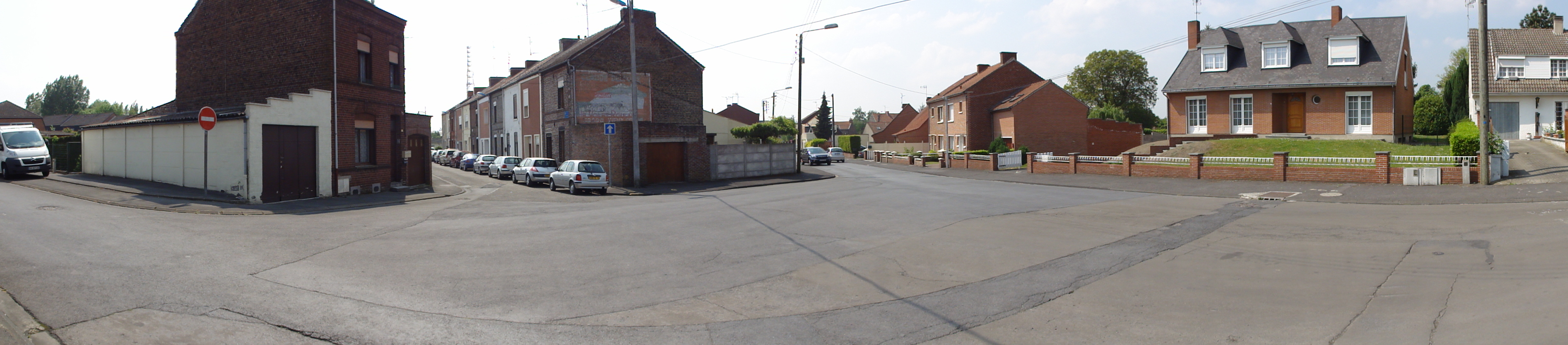 La Fosse Raismes de la Compagnie des mines d'Anzin était un charbonnage constitué de deux puits situé à Anzin, Nord, Nord-Pas-de-Calais, France.